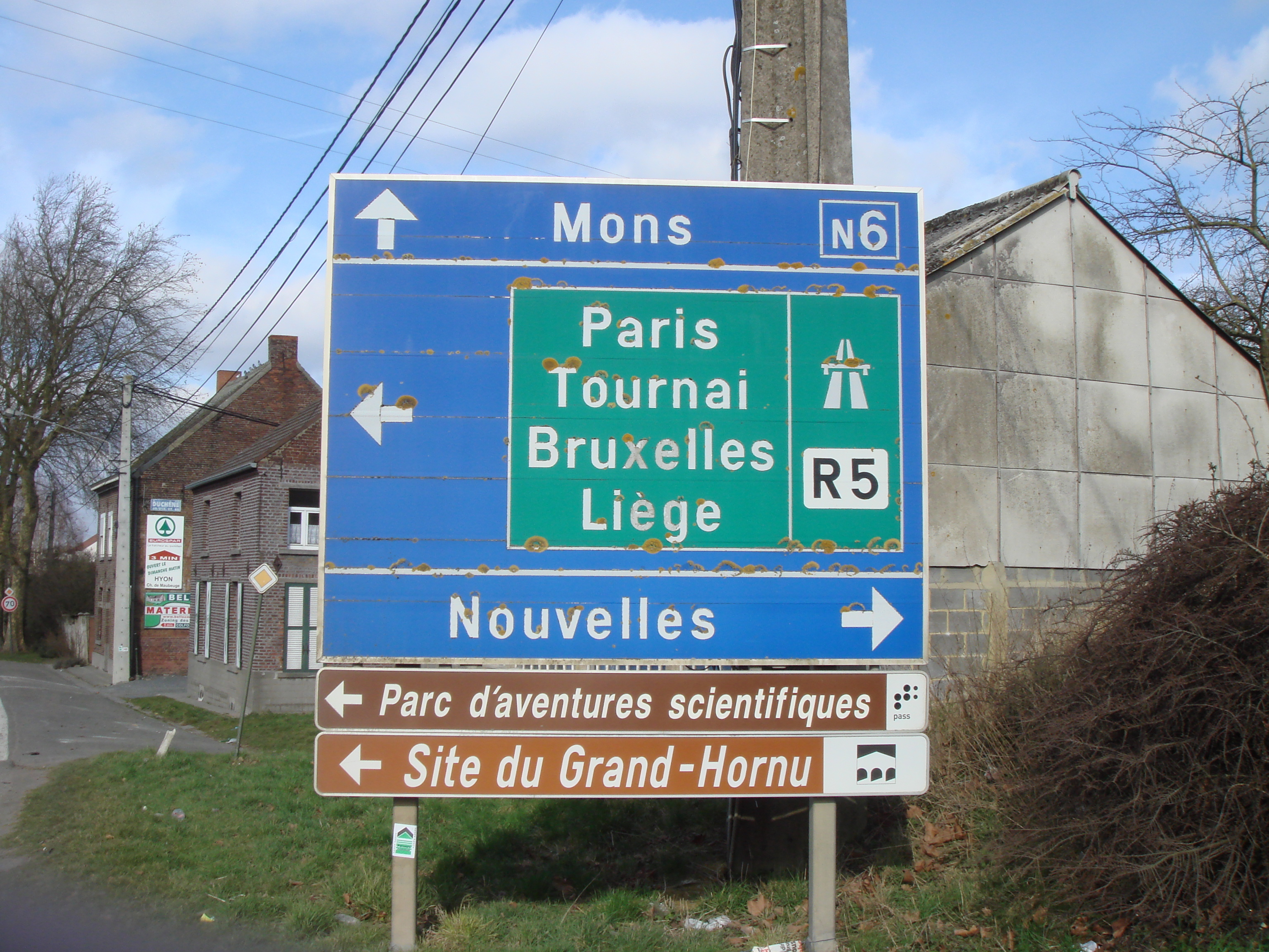 Route nationale 6 au niveau de Nouvelles